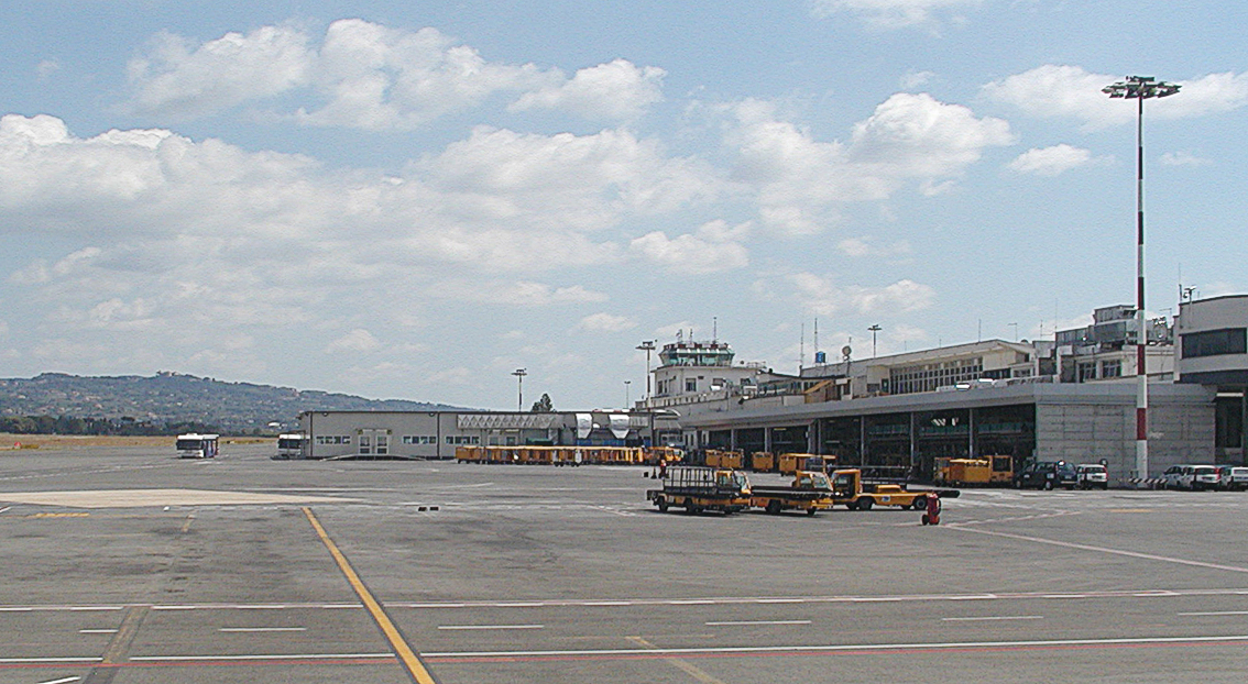 Bild vom Flughafen Rom-Ciampino